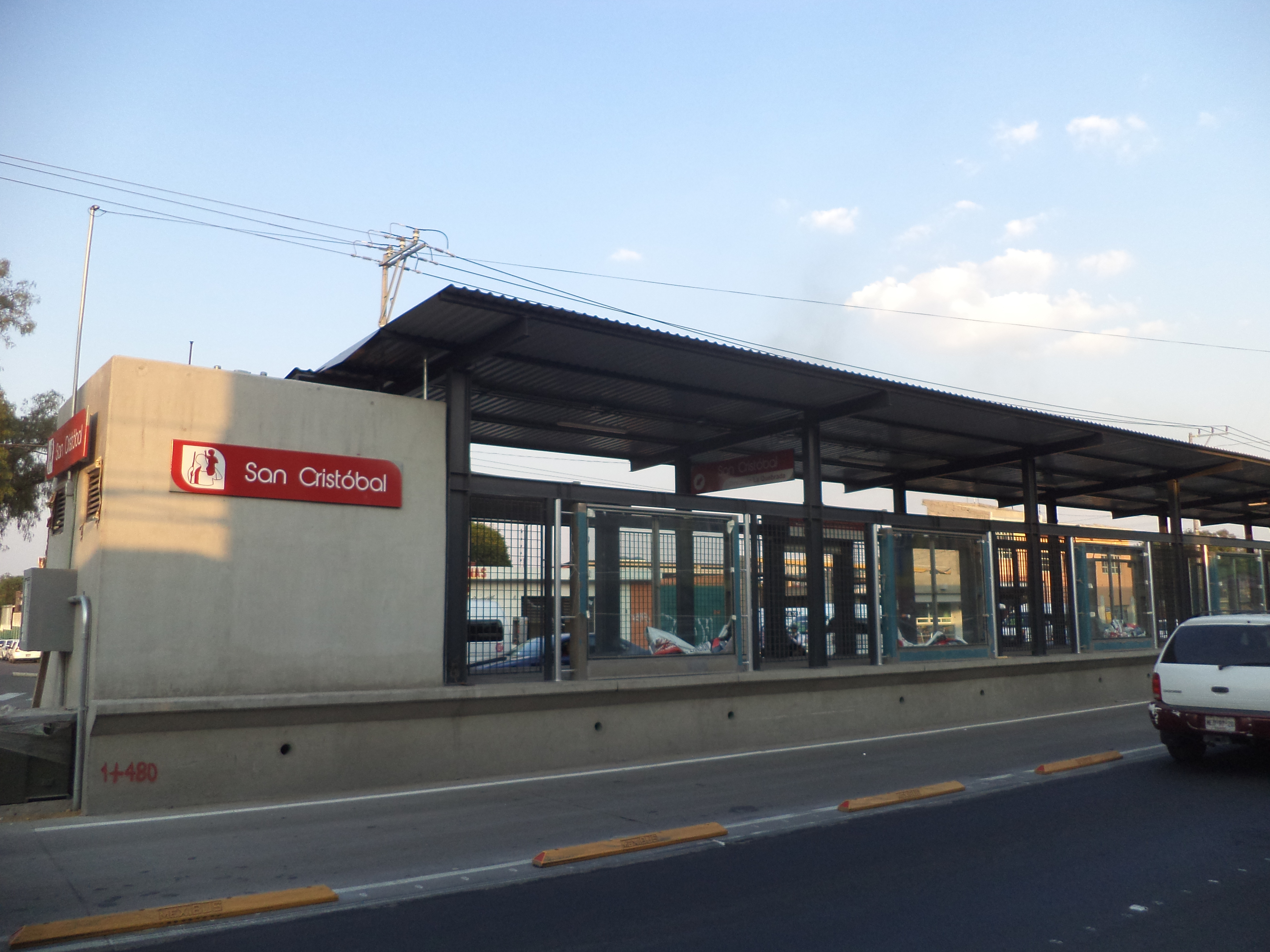 Estación San Cristóbal